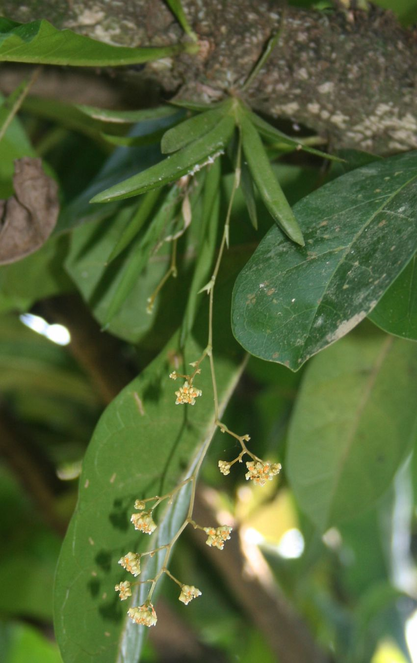 Trizeuxis falcata, Orchideen (Orchidaceae) - Costa Rica: Prov. Puntarenas, Hacienda Barú NW Dominical